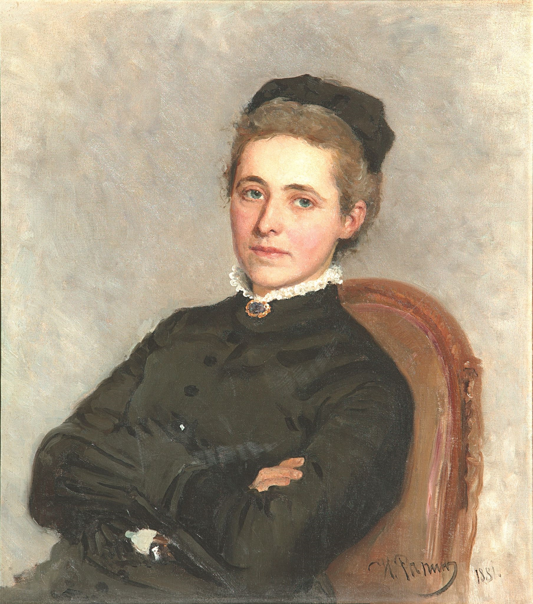 Портрет Юлии Богдановны Репман